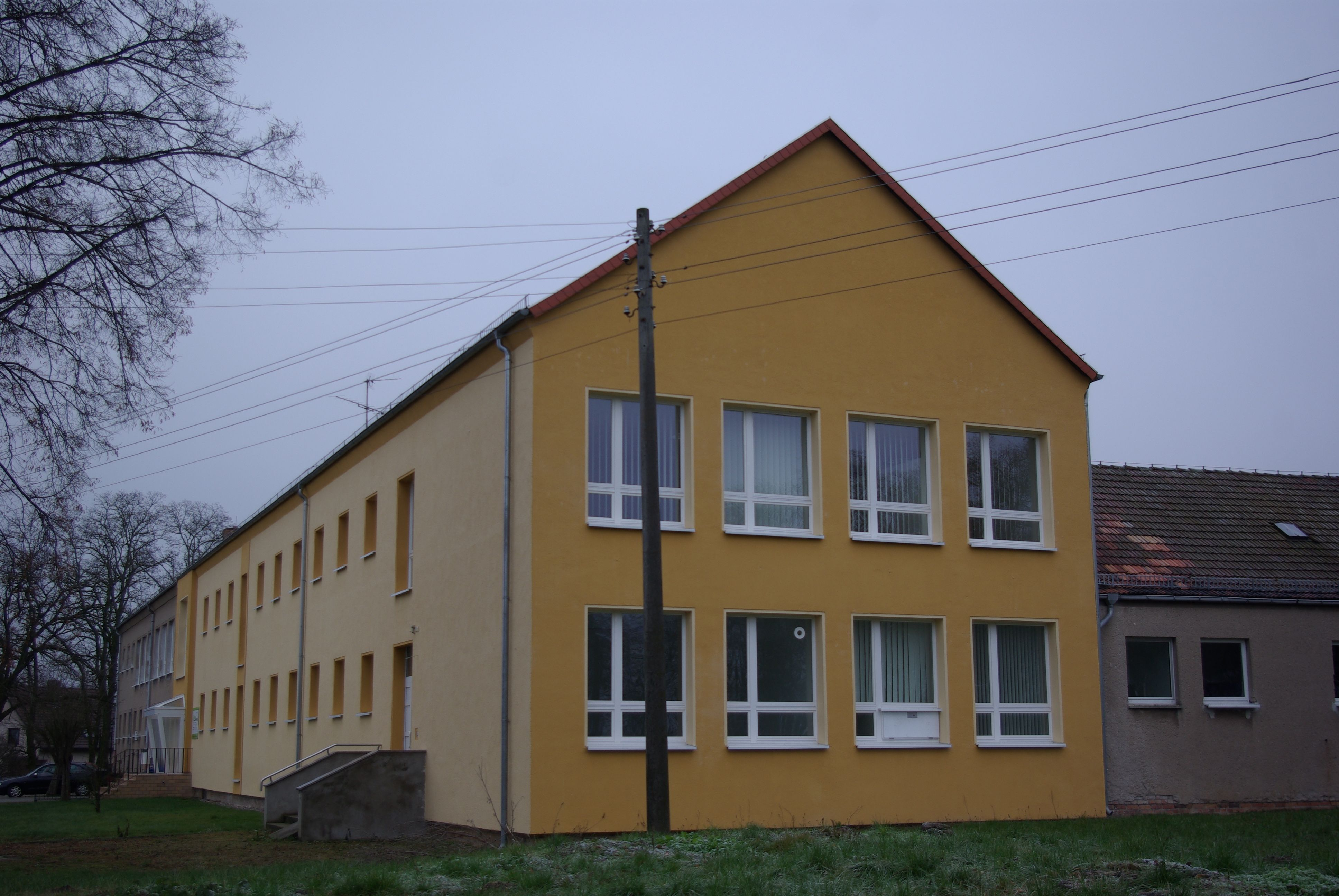 Podelzig in Brandenburg. Die Gemeindeverwaltung der Gemeinde Polzig.